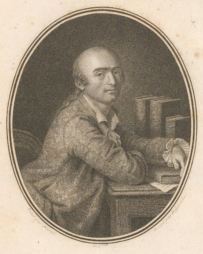 Portrait Jean-Claude Delamétherie